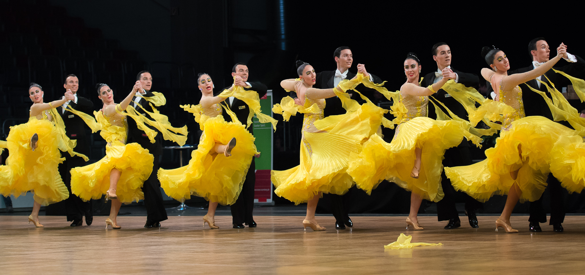 Boston-Club Düsseldorf,Brose Arena Bamberg,Deutsche Meisterschaften der Formationen Standard & Latein 2016,Standard,Tanzsport,Whitney